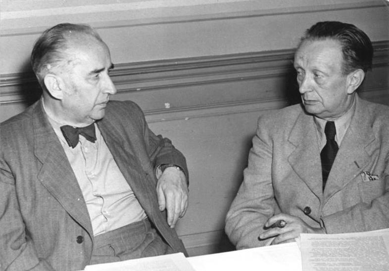 Zentralbild-Köhler Kno-Be. 7.5.52 Arbeitstagung des Deutschen Schriftstellerverbandes über das Kinder- und Jugendbuch. Am 7. mai 1952 fand im Klub der Kulturschaffenden in Berlin eine Tagung des Deutschen Schriftstellerverbandes statt. Thema der Tagung war das neue Kinder- und Jugendbuch. Stalinfriedenspreisträgerin Anna Seghers leitete die Arbeitstagung ein, auf der 200 Schriftsteller aus der DDR anwesend waren. UBz: An der Tagung nahmen auch (v.l.n.r.) Prof. Erich Sielaff aus Rostock und der Schriftsteller Ehm Welk (Bad Doberan) teil.